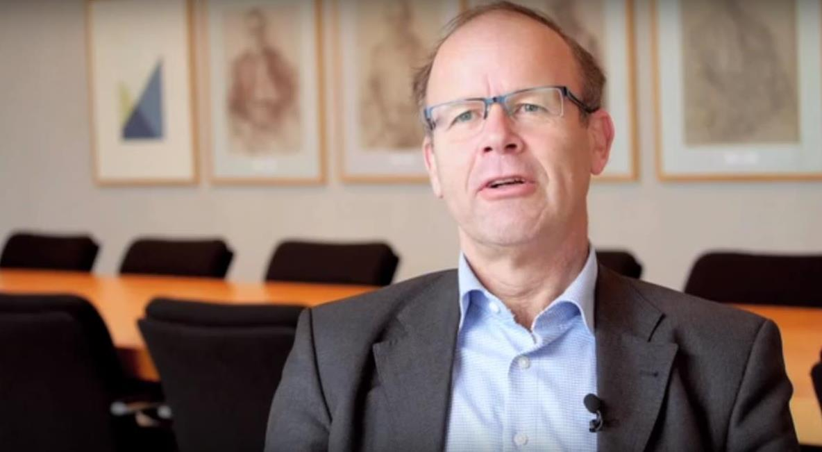 Met innovaties kan Nederland weer pensioenkampioen worden stelt Lans Bovenberg, hoogleraar economie Netspar - Tilburg University. In zijn oratie ter gelegenheid van het aanvaarden van een pensioenleerstoel pleit Bovenberg voor een drietal innovaties van het huidige pensioenstelsel om het collectieve te behouden, meer keuzevrijheid te geven en meer maatwerk voor de deelnemers, ook voor bijvoorbeeld ZZP-ers.